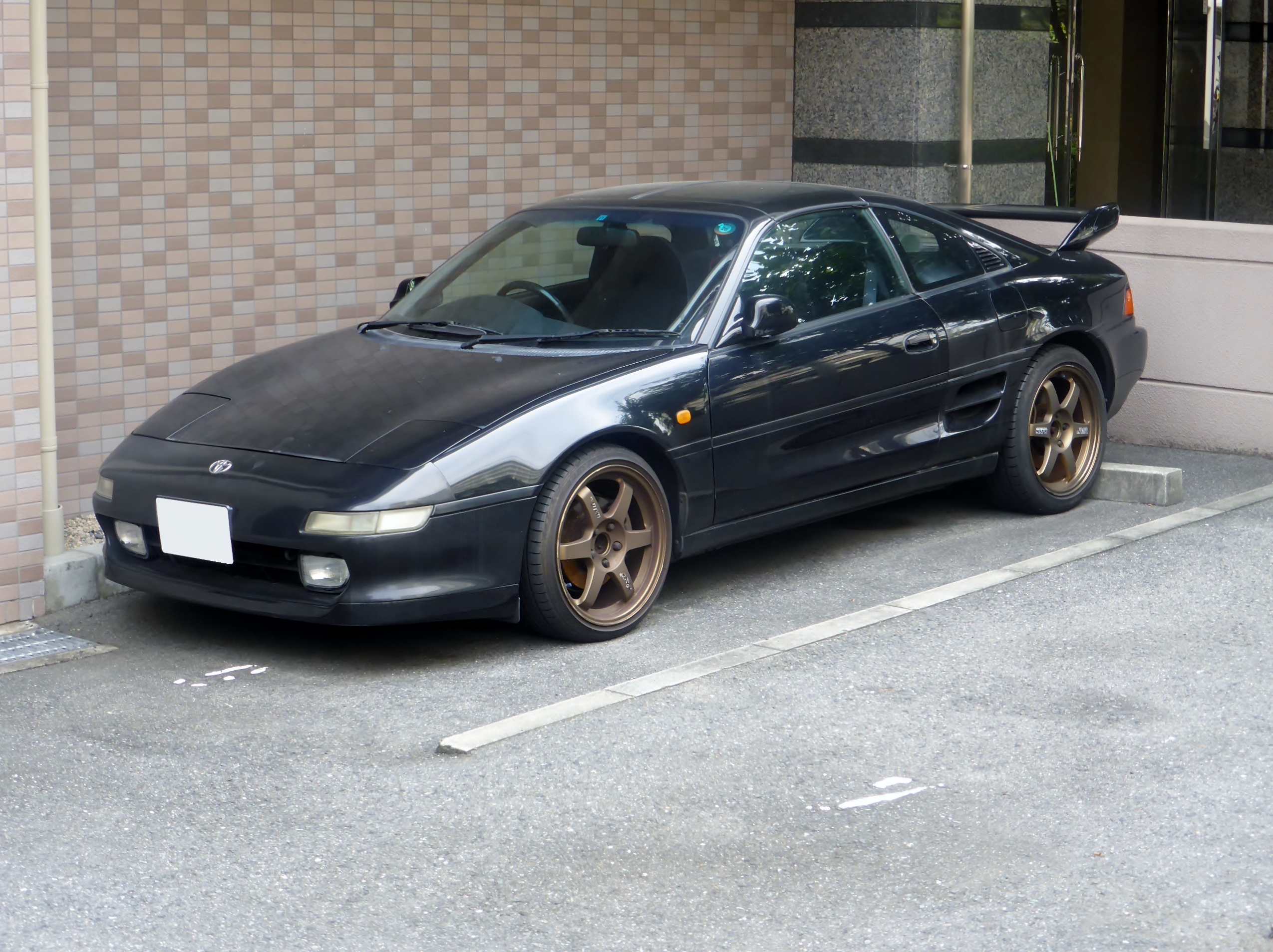 SW20型トヨタ・MR2 Gリミテッドをフロントから撮影。